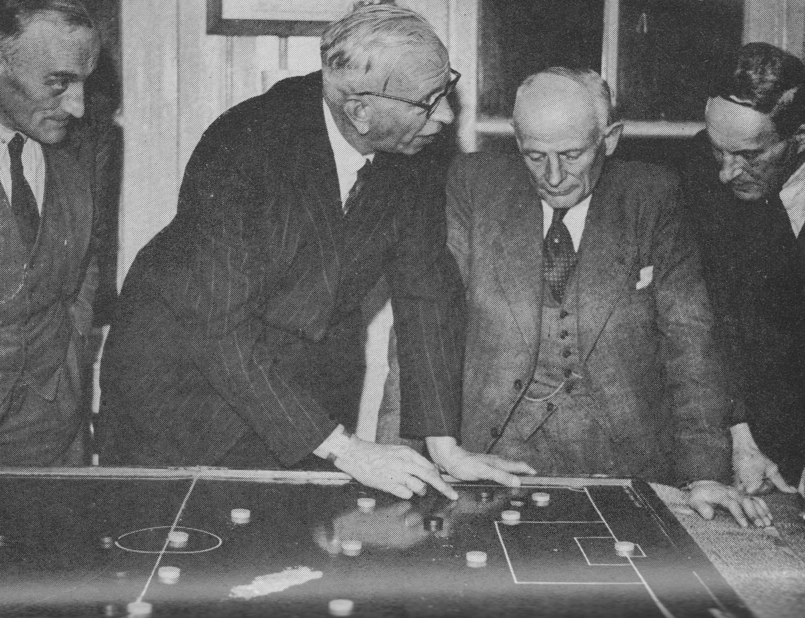 Tactische besprekingen over het Nederlands voetbalelftal op het terrein van VUC. V.l.n.r: Otto de Vries, Henk Herberts, Loe Boeljon en Miel Mundt.